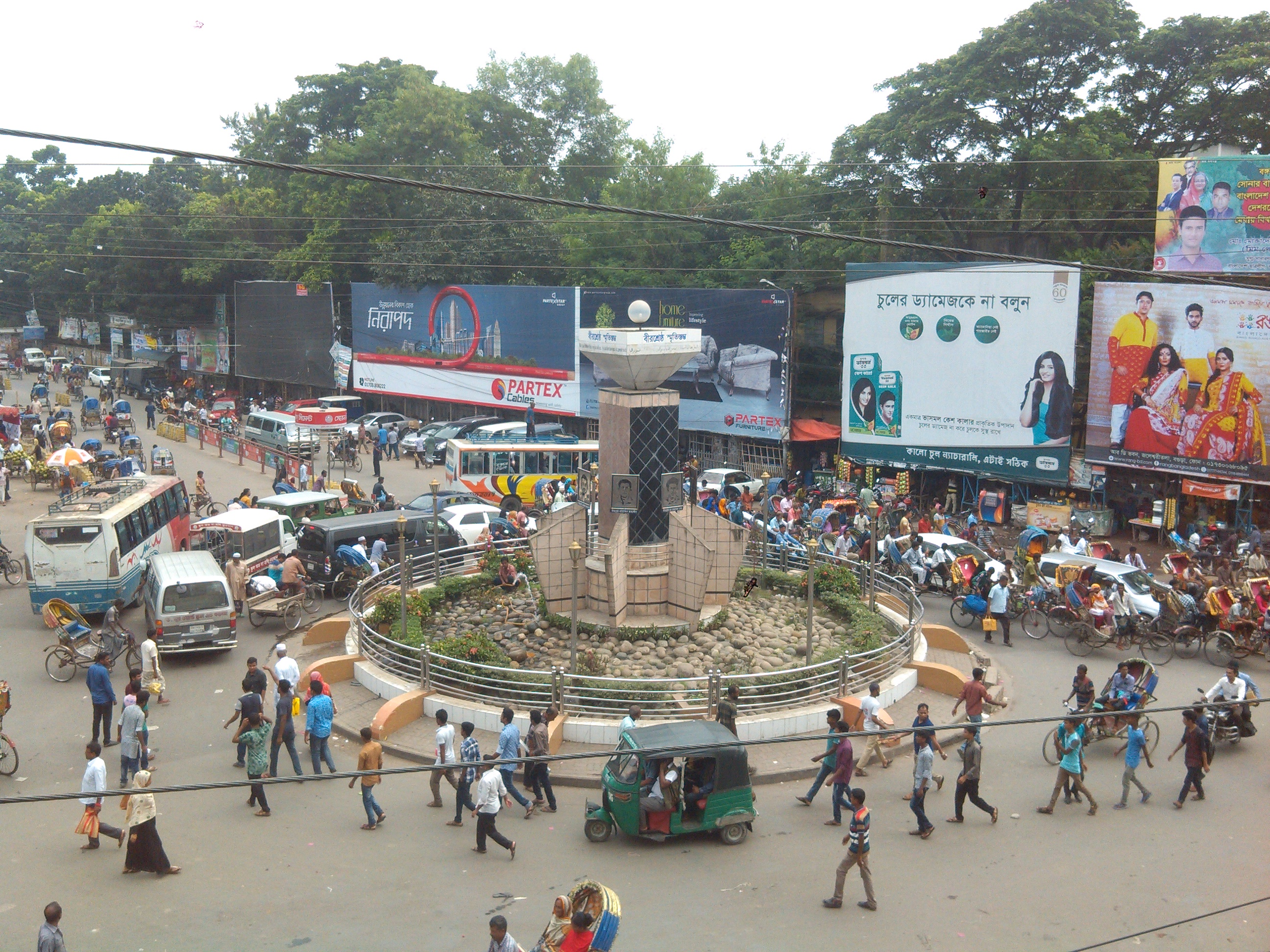 বীরশ্রেষ্ঠ স্মৃতি স্তম্ভ, সাতমাথা